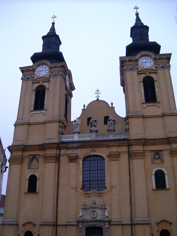 A római katolikus püspöki székesegyház Székesfehérvár belvárosának legmagasabb pontján